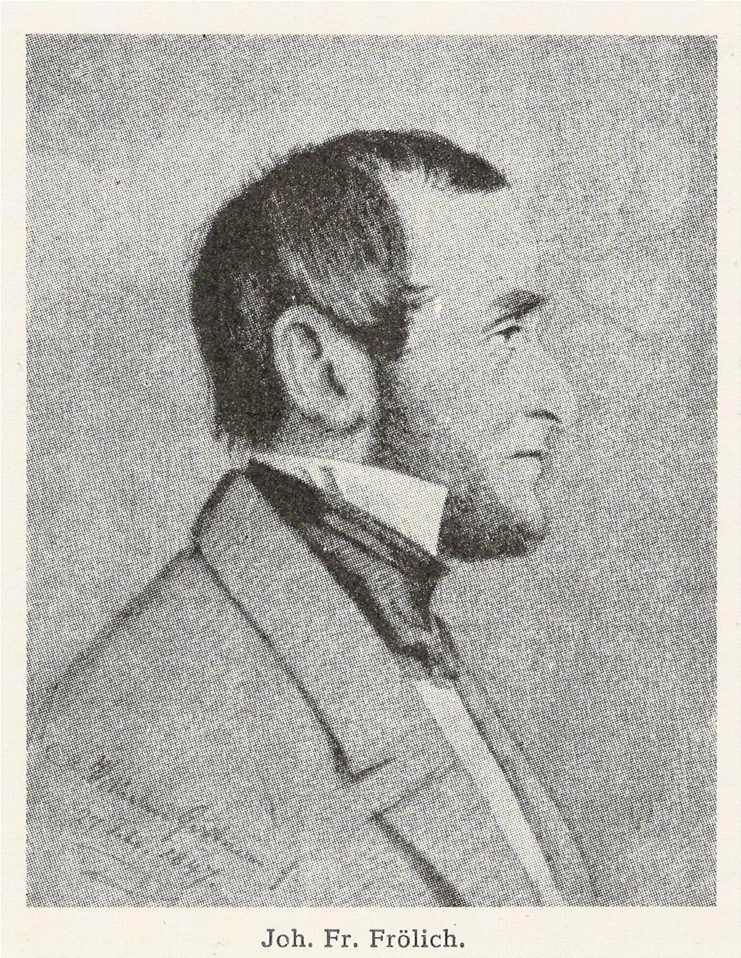 Tegning af komponisten Frederik Frølich (1806-1860). Frederiksborgmuseet